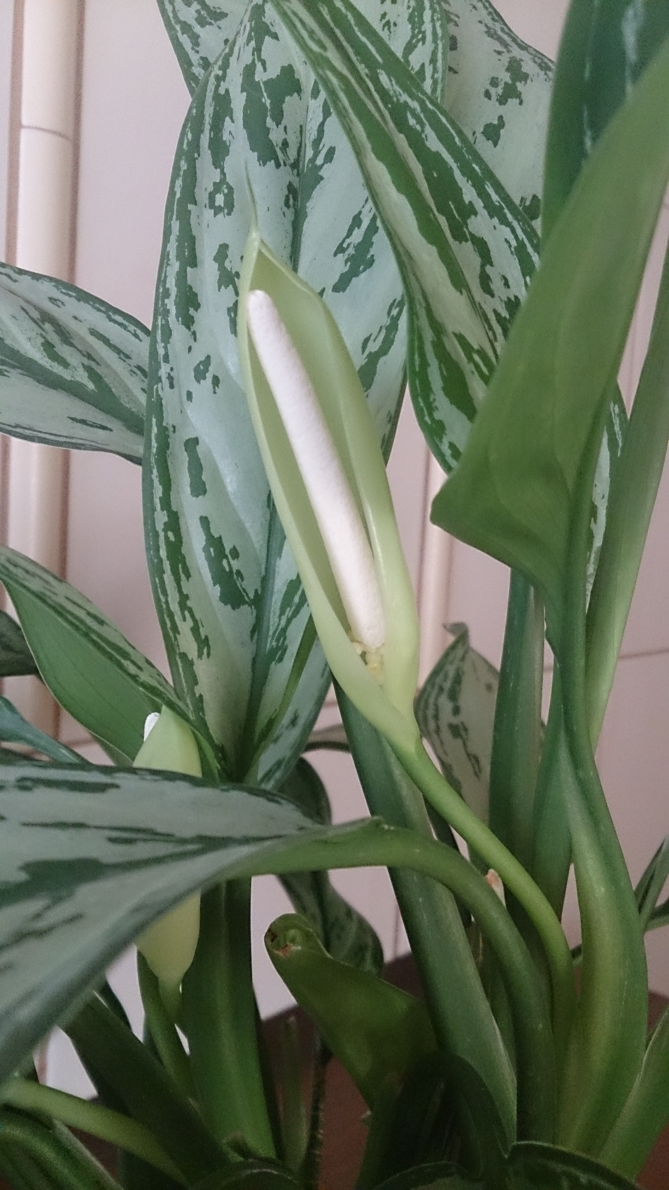 Zdjęcie ukazuje kwiatostan aglaonemy zmiennej (kolba), typowy dla obrazkowatych.